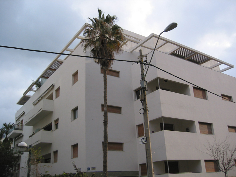 House Gordon Street 9